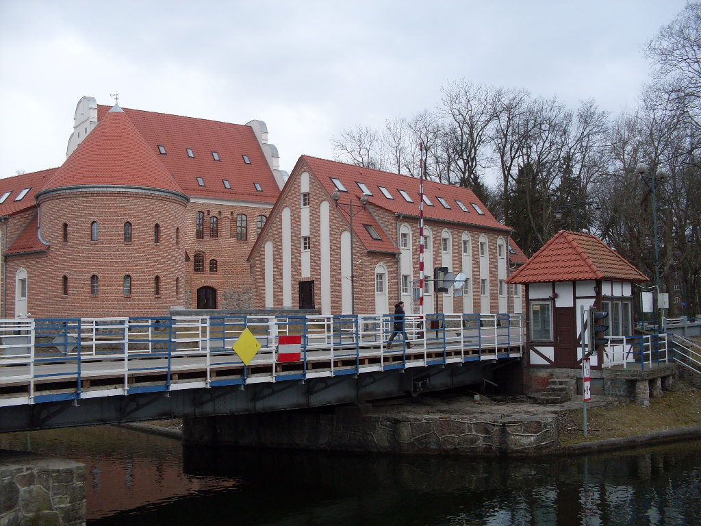 Schloß Lötzen mit Drehbrücke im April 2012. Die gekrümmten Streifenmuster auf den Ziegelmauern sind ein Bildfehler und entstehen durch den Moiré-Effekt.